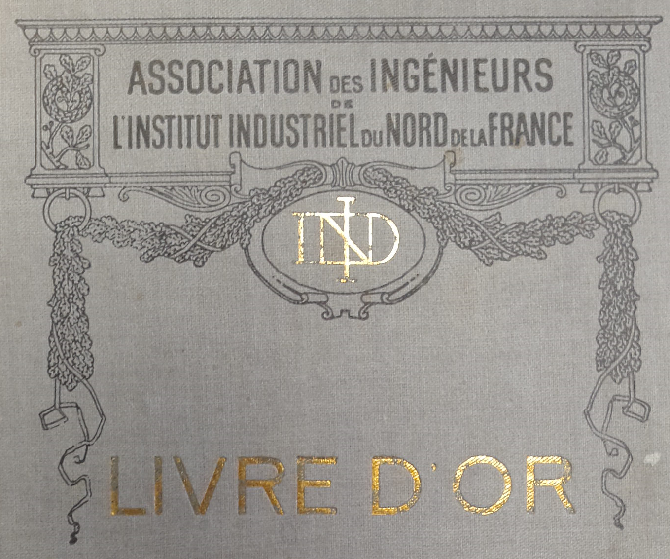 IDN Institut Industriel du Nord de la France - Livre d'Or 1914 1918